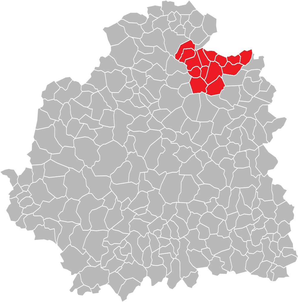 Carte des communes de l'Indre (36) : Le canton de Vatan, de 1790 à 2015.